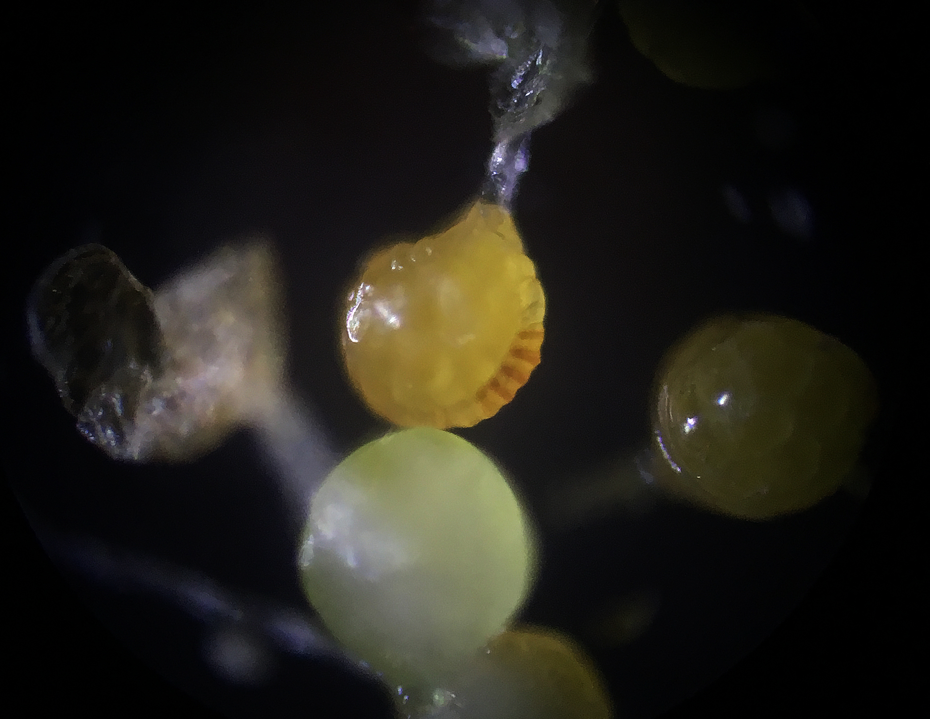 Sporangium met zeven verdikte annuluscellen gescheiden van de sporangium-aanhechtingssteel door drie onverdikte cellen.